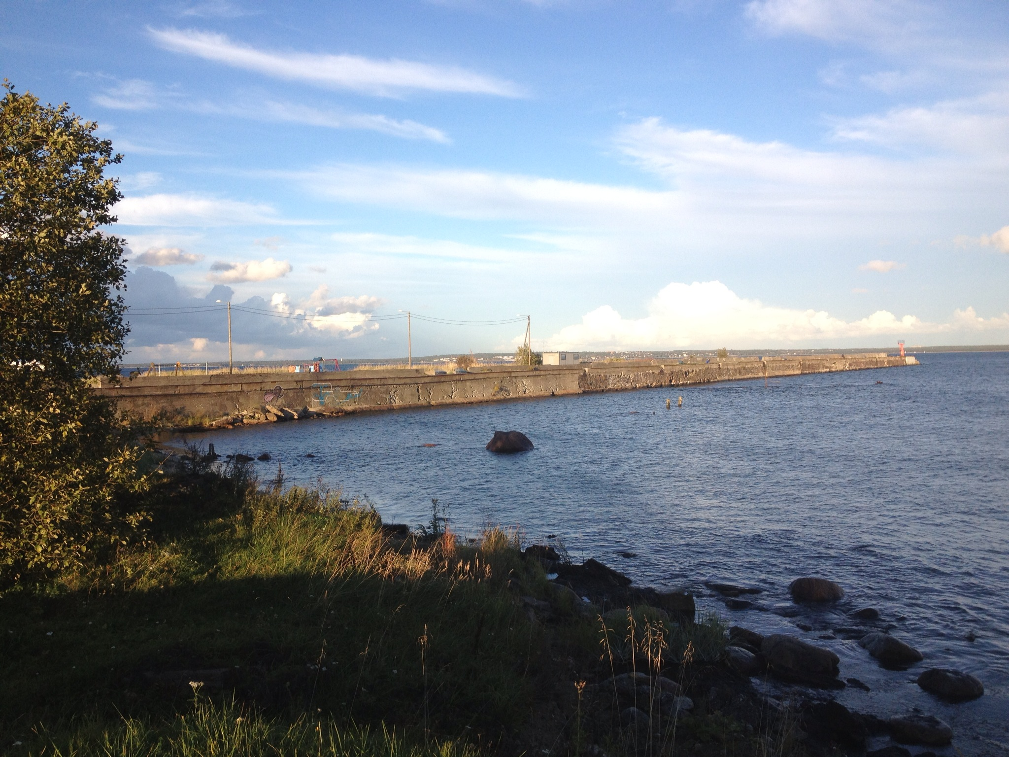 Paljassaare sadamasild ehk nn. Katariina muul, 1913-1916